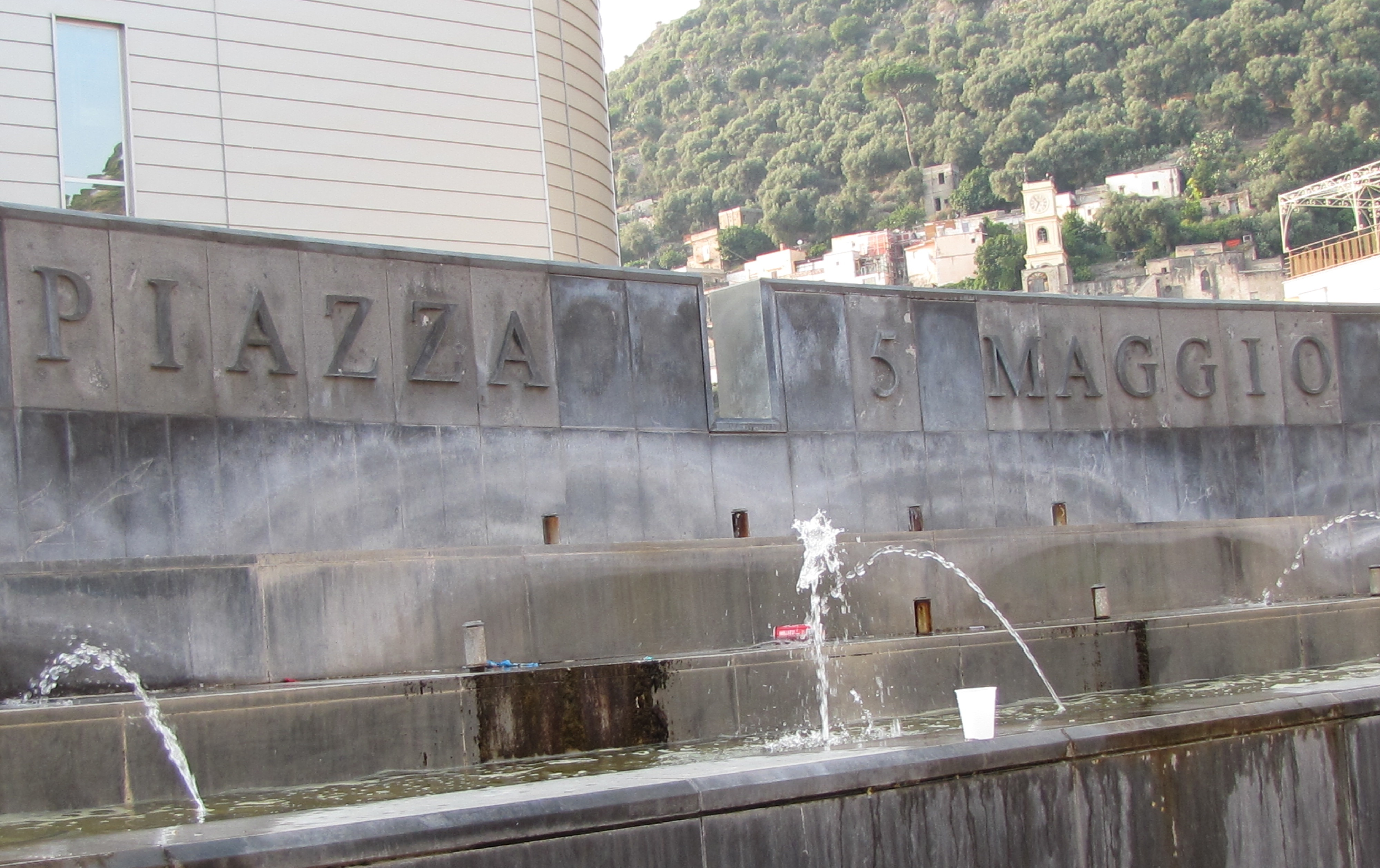 Sarno, Piazza 5 Maggio: Fontana-monumento in ricordo dell'alluvione di Sarno; sullo sfondo il monte Saretto. Il 5 maggio 1998 il comune di Sarno fu colpito, insieme con i vicini centri di Quindici, Bracigliano e Siano, da un gravissimo fenomeno franoso, composto da colate rapide di fango, che interessò la metà del territorio comunale. L'evento provocò la distruzione di molte abitazioni e la morte di 137 persone nella sola Sarno.